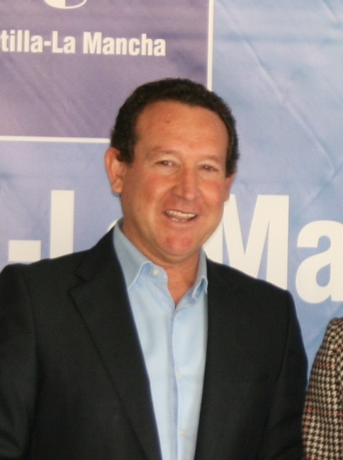 02-04-2012 Reunión de Marta García, consejera de Fomento, con el alcalde de Mocejón.